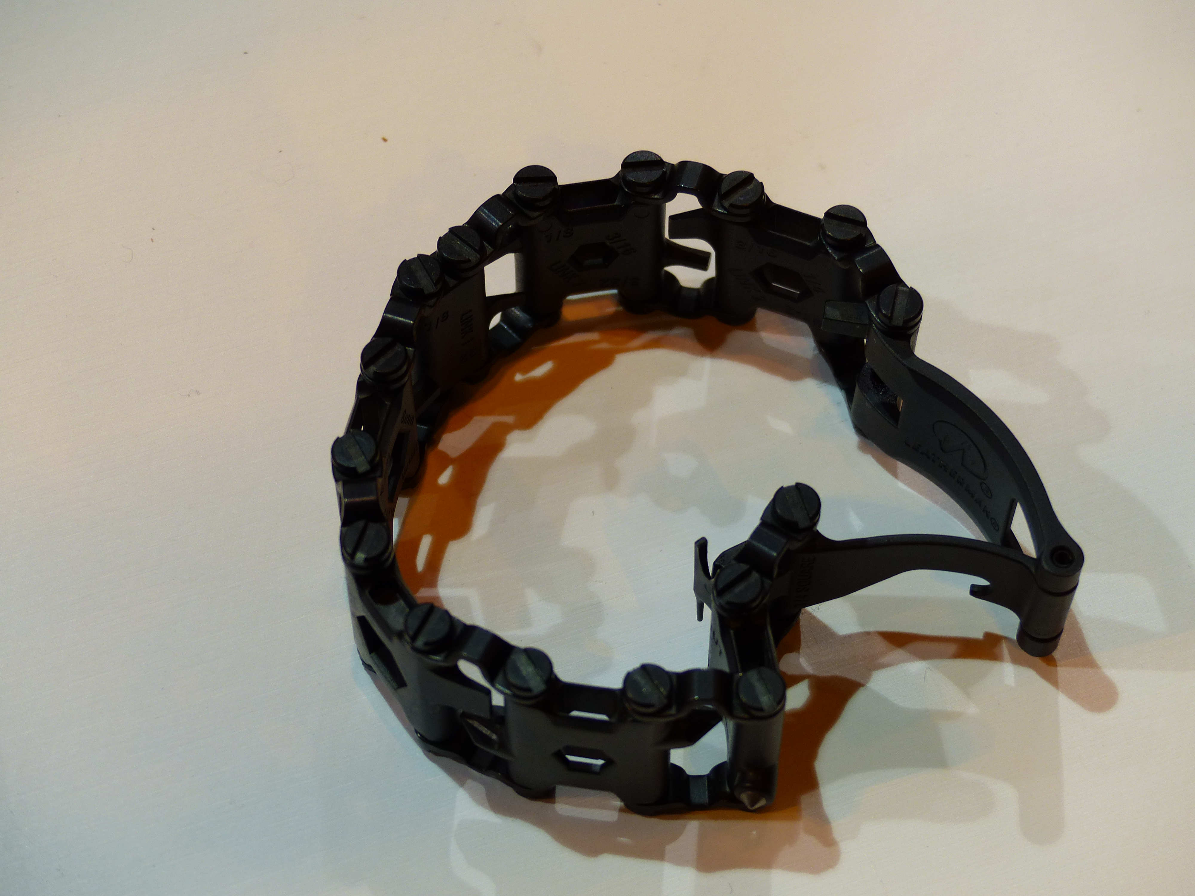 Leatherman, pulsera